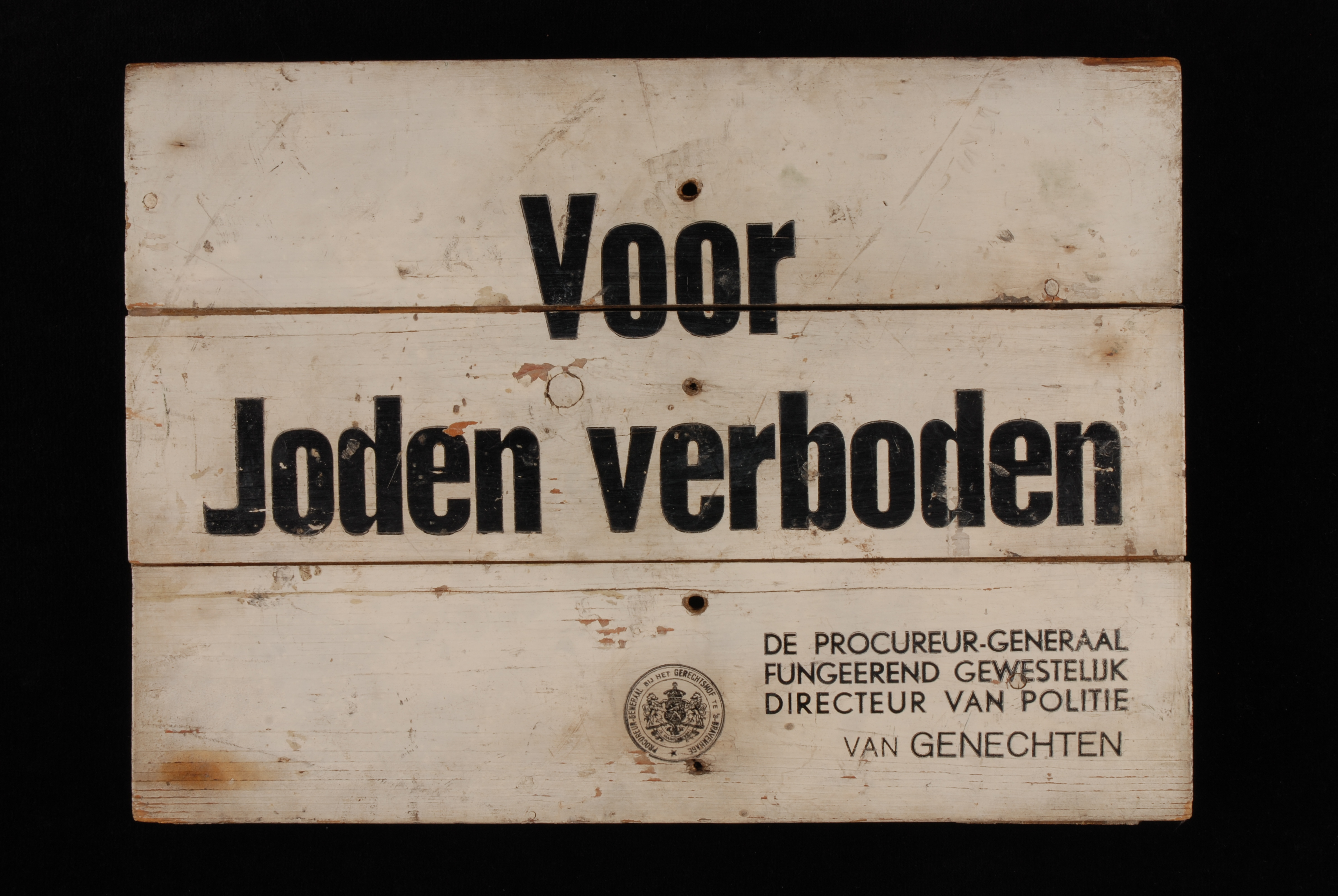 Objectgegevens Titel: Wit houten bord met in zwarte letters “Voor / Joden verboden / De procureur-generaal / fungeerend gewestelijk / directeur van politie / Van Genechten” Beschrijving: Wit geschilderd bord met zwart opschrift en stempel. Trefwoorden: informatiebord, informatievorm Opschrift / merk: Geschilderd: "Voor / Joden verboden / De procureur-generaal / fungeerend gewestelijk / directeur van politie / Van Genechten". Gestempeld: "PRODUCURE-GENERERAAL BIJ HET GERECHTSHOF TE ´S-GRAVENHAGE" met nazi-teken. Datering: 1940 - 1943 Materiaal: hout, verf Afmetingen: (cm) hg 29,0 / br 39,5 / dp 2,8 Associatie: informeren, oorlog, Tweede Wereldoorlog, bezetting, NSB, justitie Inventarisnr: Museum Rotterdam 40205